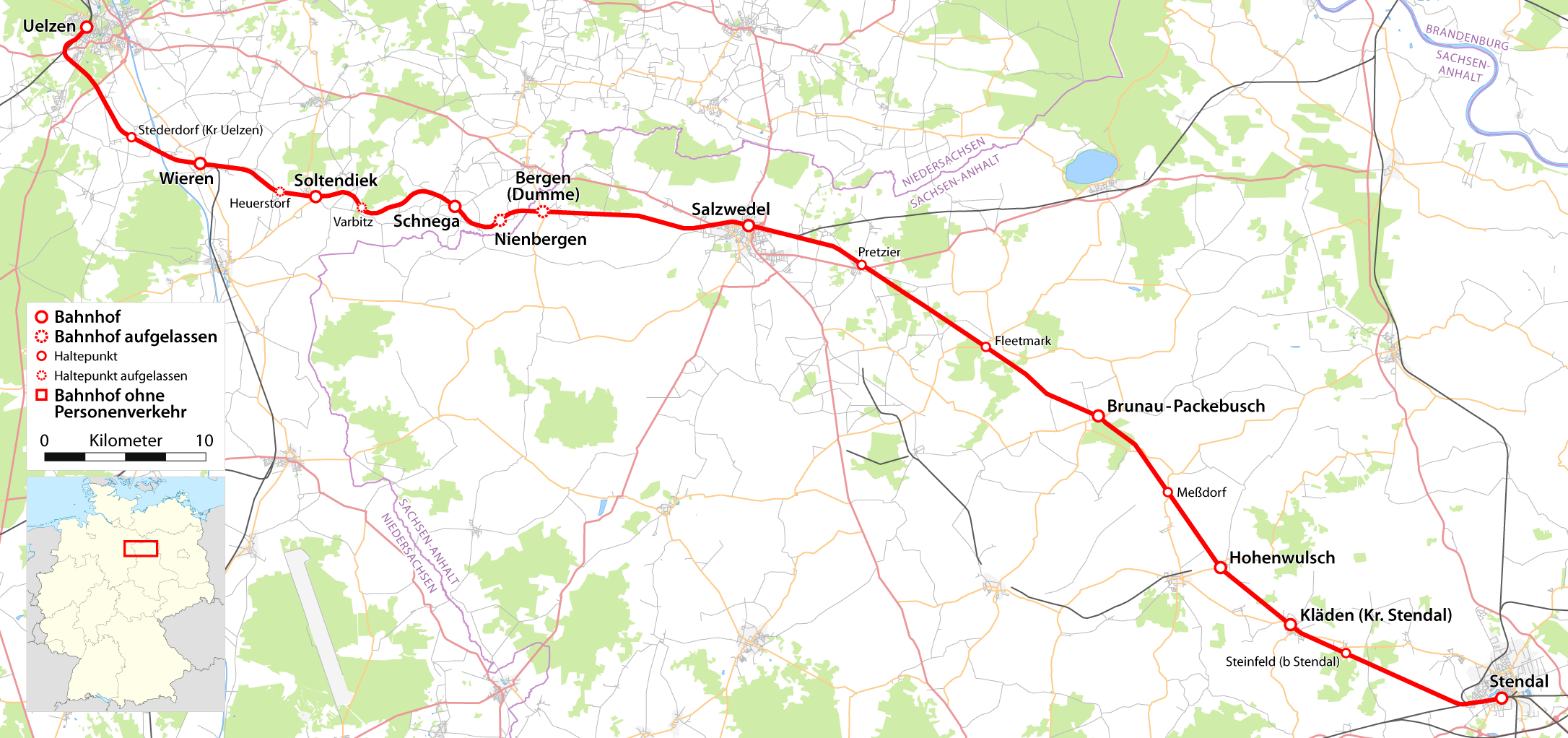 Karte der Bahnstrecke Uelzen - Stendal